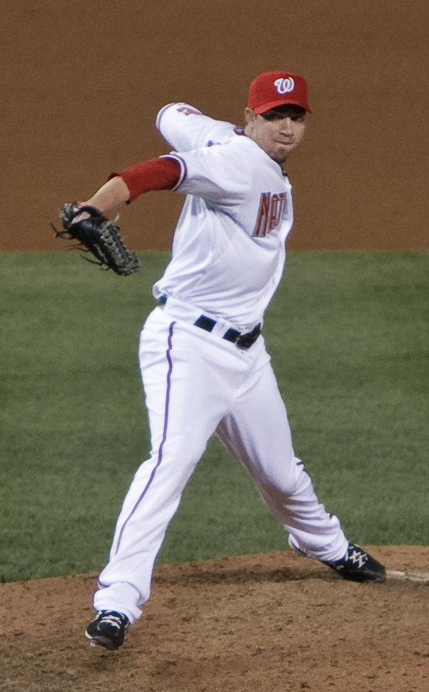 Sean Burnett